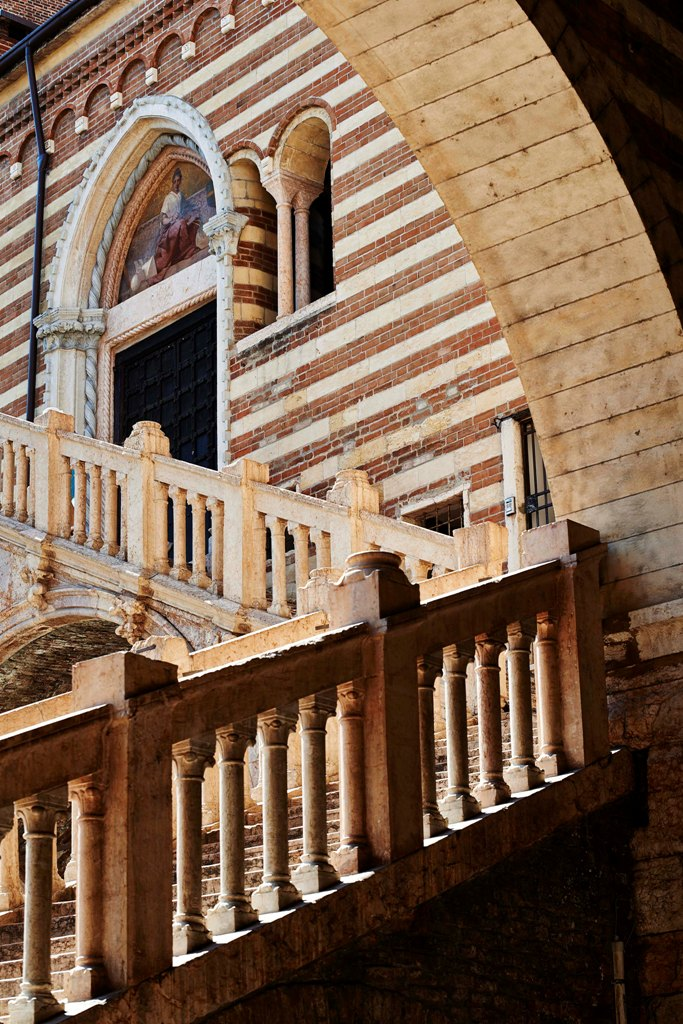 Lunetta con affresco di G. Bevilacqua della Scala della Ragione in Palazzo della Ragione a Verona